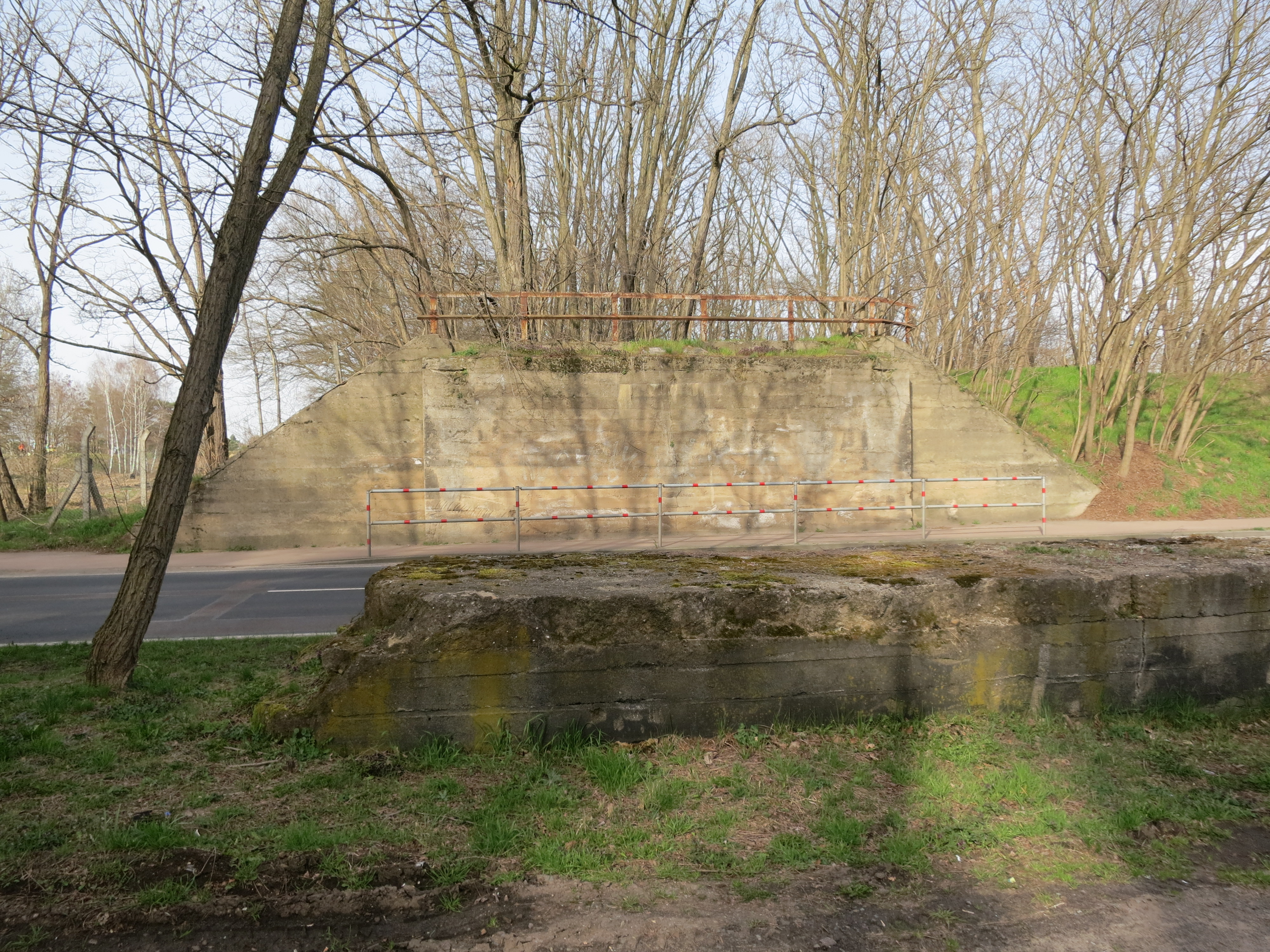 Jüterbog, Widerlager einer Überführung für den einst geplanten viergleisigen Ausbau der Anhalter Bahn nordöstlich des Bahnhofs